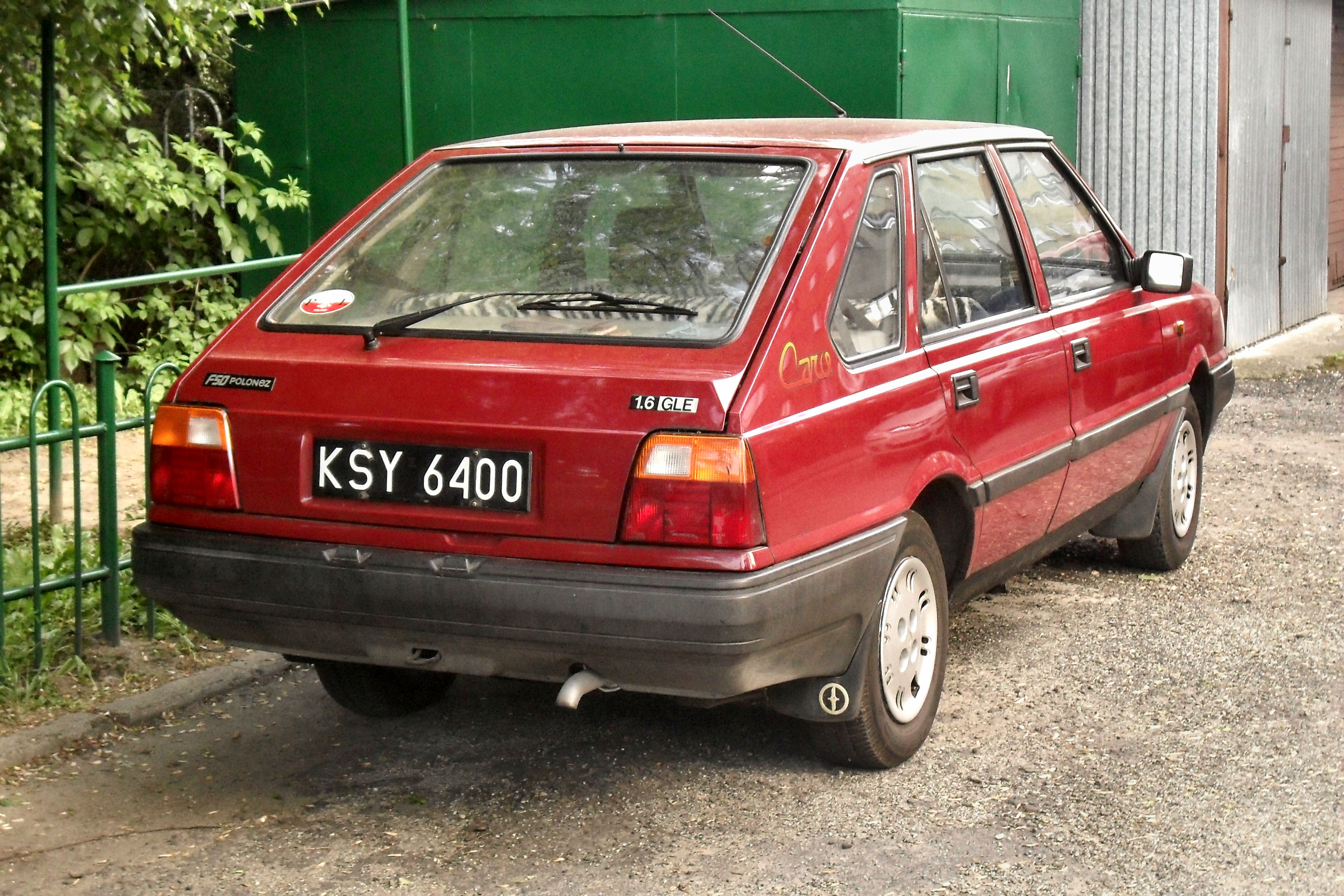 FSO Polonez Caro MR'91 1.6 GLE z 1993 roku w Jaśle.